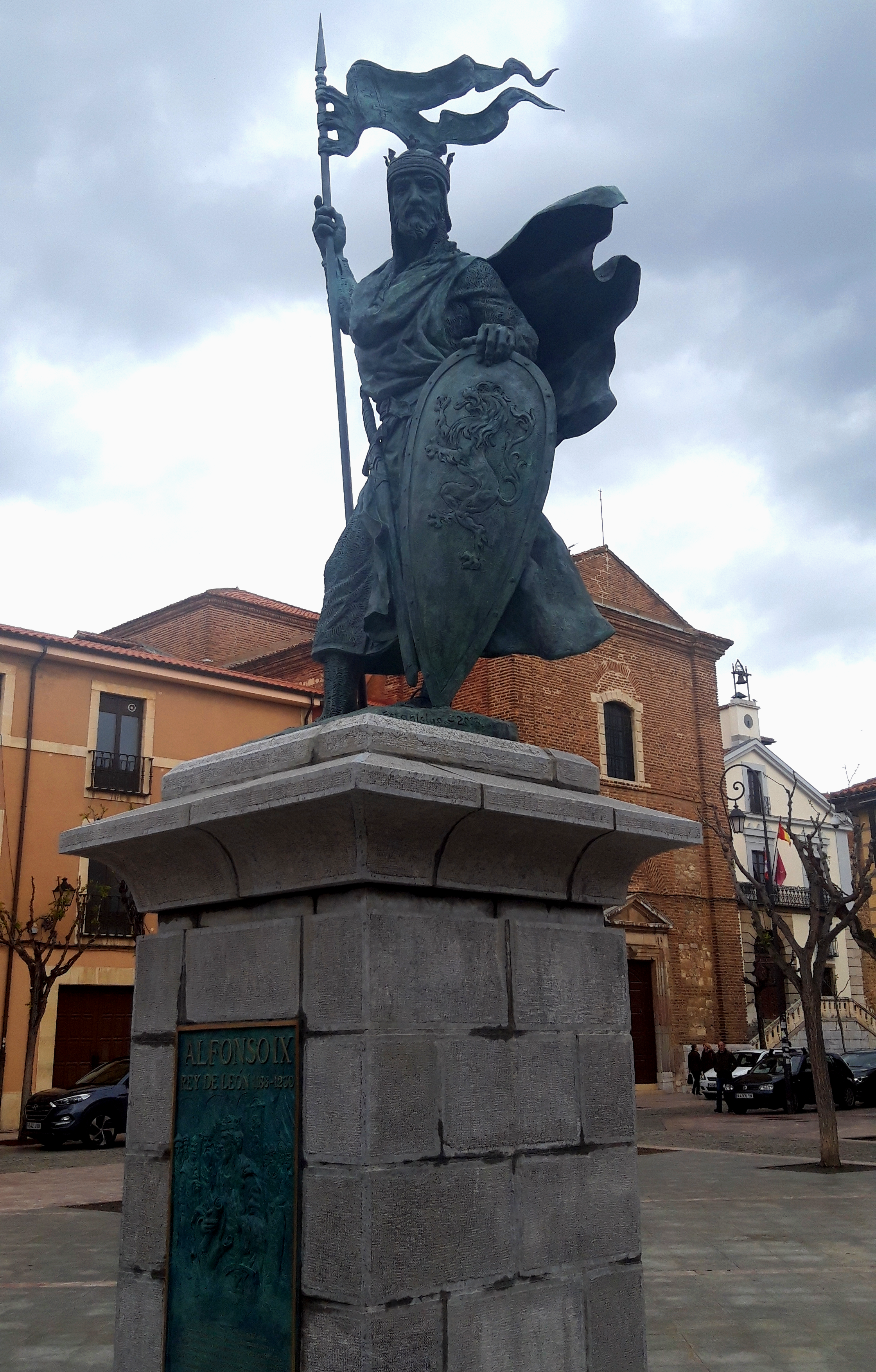 Escultura de Alfonso IX de León en la plaza de Santo Martino